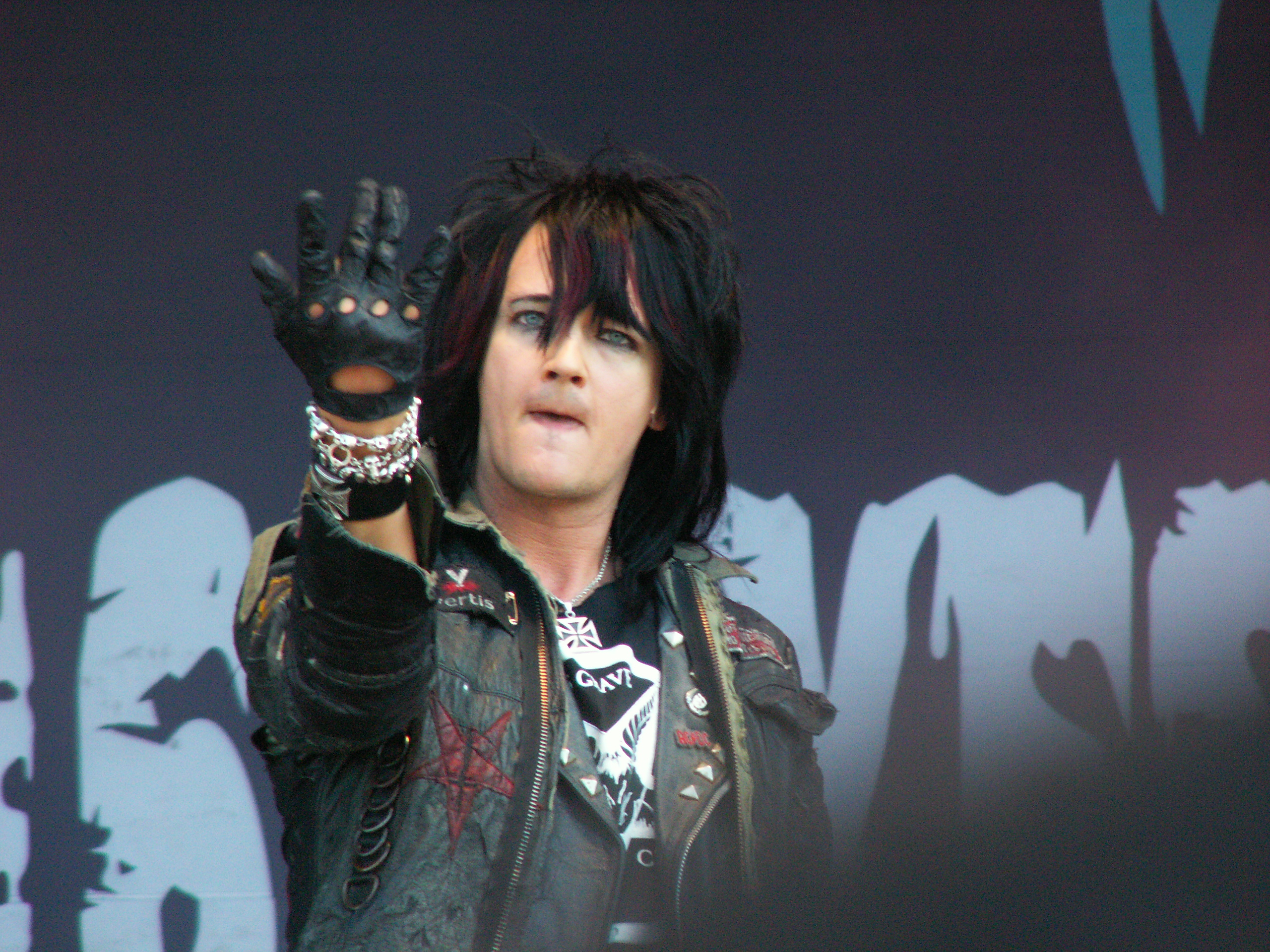 Der Musiker Jyrki 69 (Gesang) von der finnischen Dark-Rock-Band The 69 Eyes, beim M’era Luna Festival 2007 in Hildesheim, Deutschland.